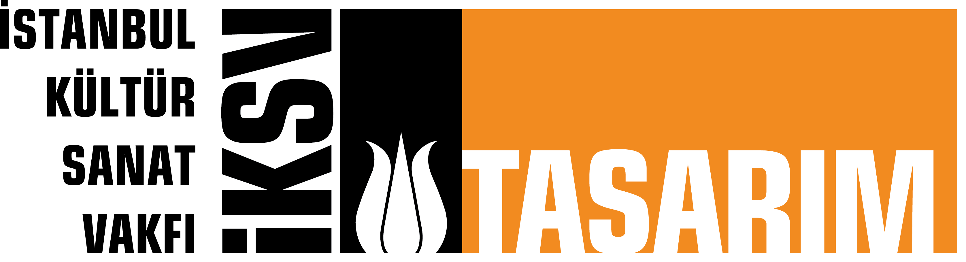 İstanbul Tasarım Bienali logosu